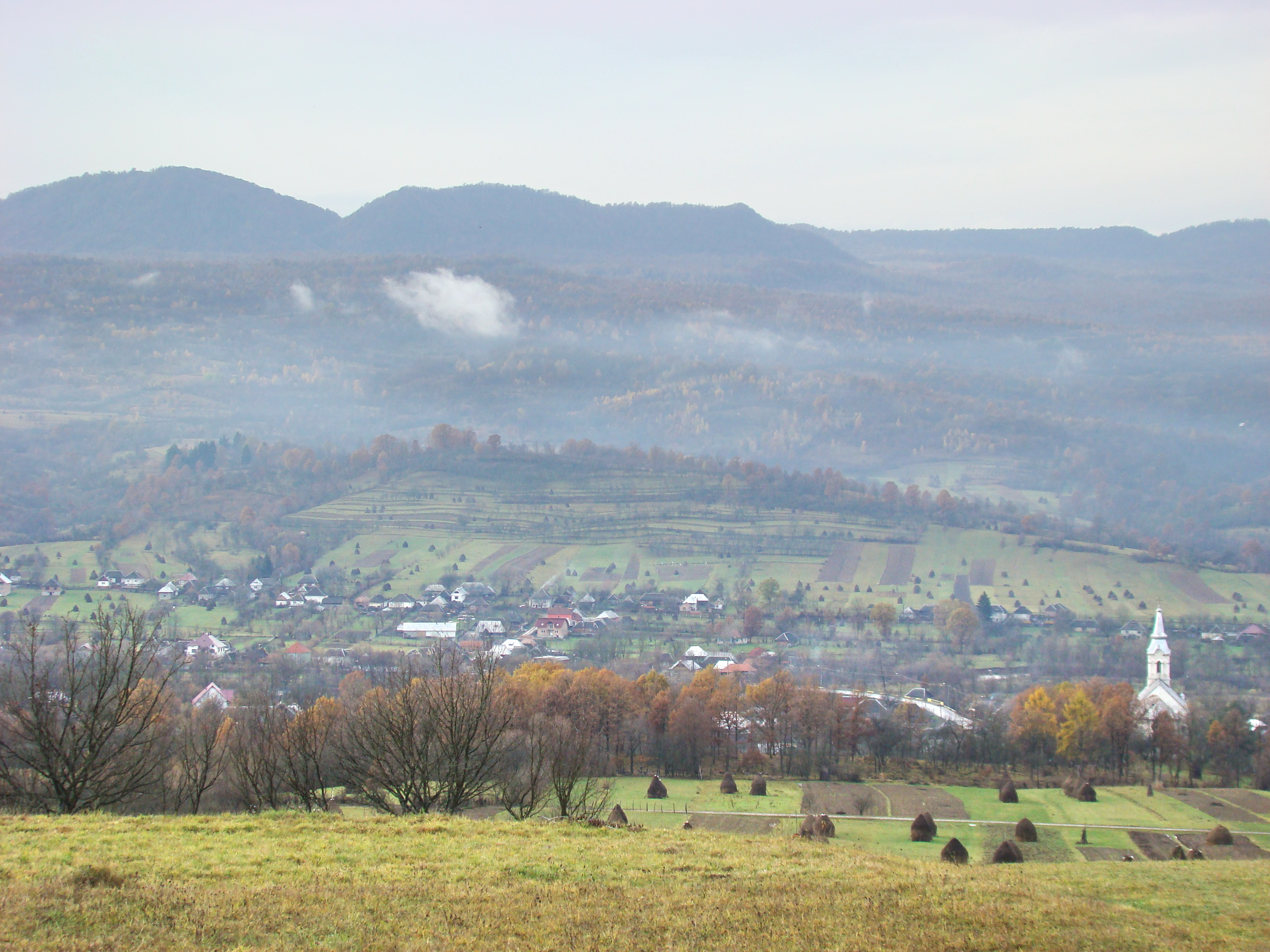 Ocna Șugatag (Aknasugatag) village, Maramureș county, Romania